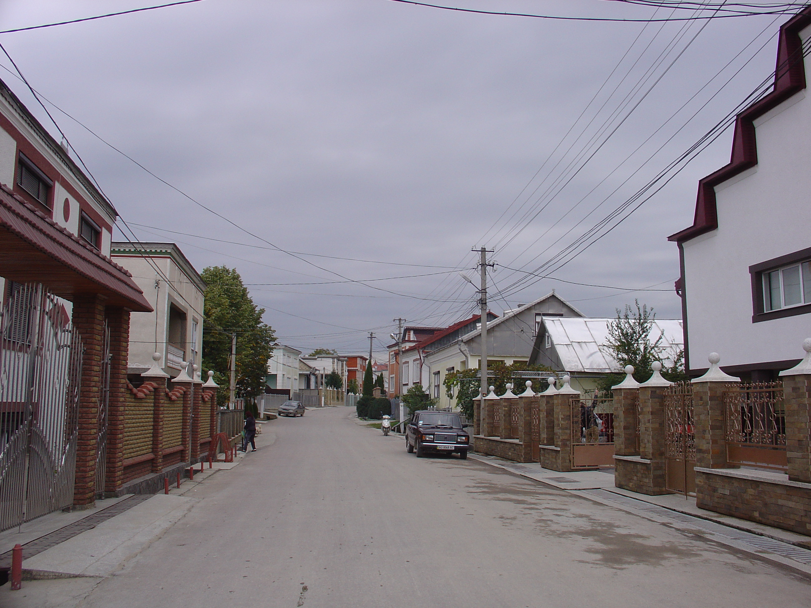 с. Середнє Водяне (Рахівський р-н, Закарпатська обл.)